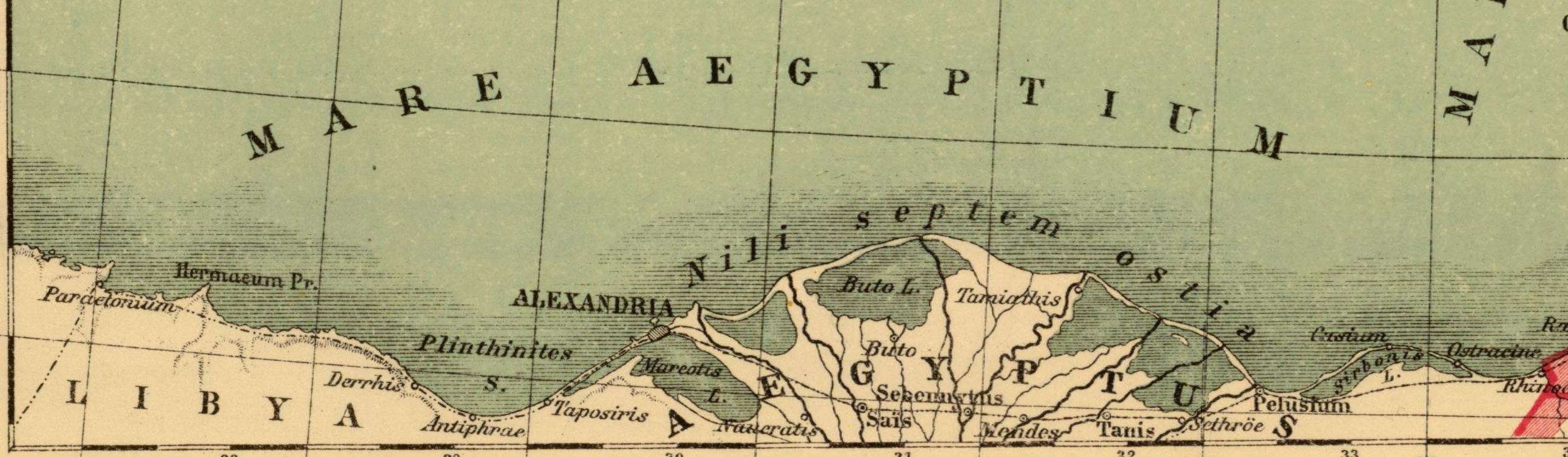 Aegyptus.Mare.Aegyptium.Libya. Asia citerior. Auctore Henrico Kiepert Berolinensi. Geographische Verlagshandlung Dietrich Reimer (Ernst Vohsen) Berlin, Wilhemlstr. 29. (1903)